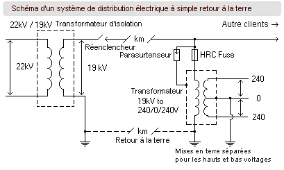 Schéma d'un système de distribution électrique à simple retour à la terre